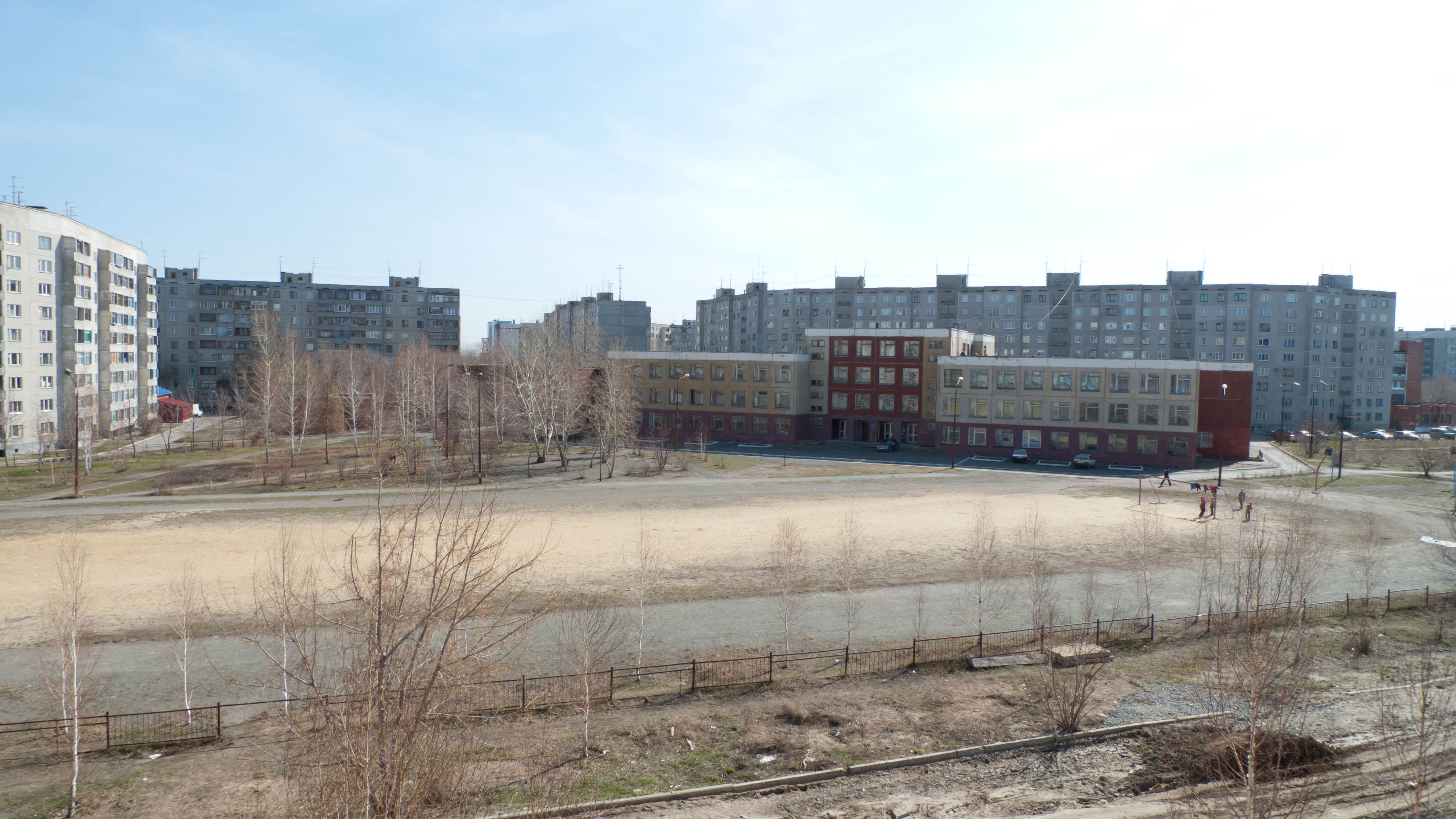 Школа